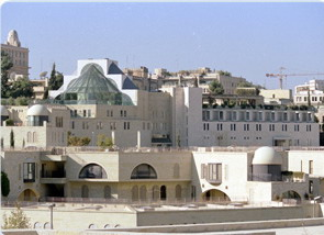 Mercaz Shimshon-Beit Shmuel in Jerusalem